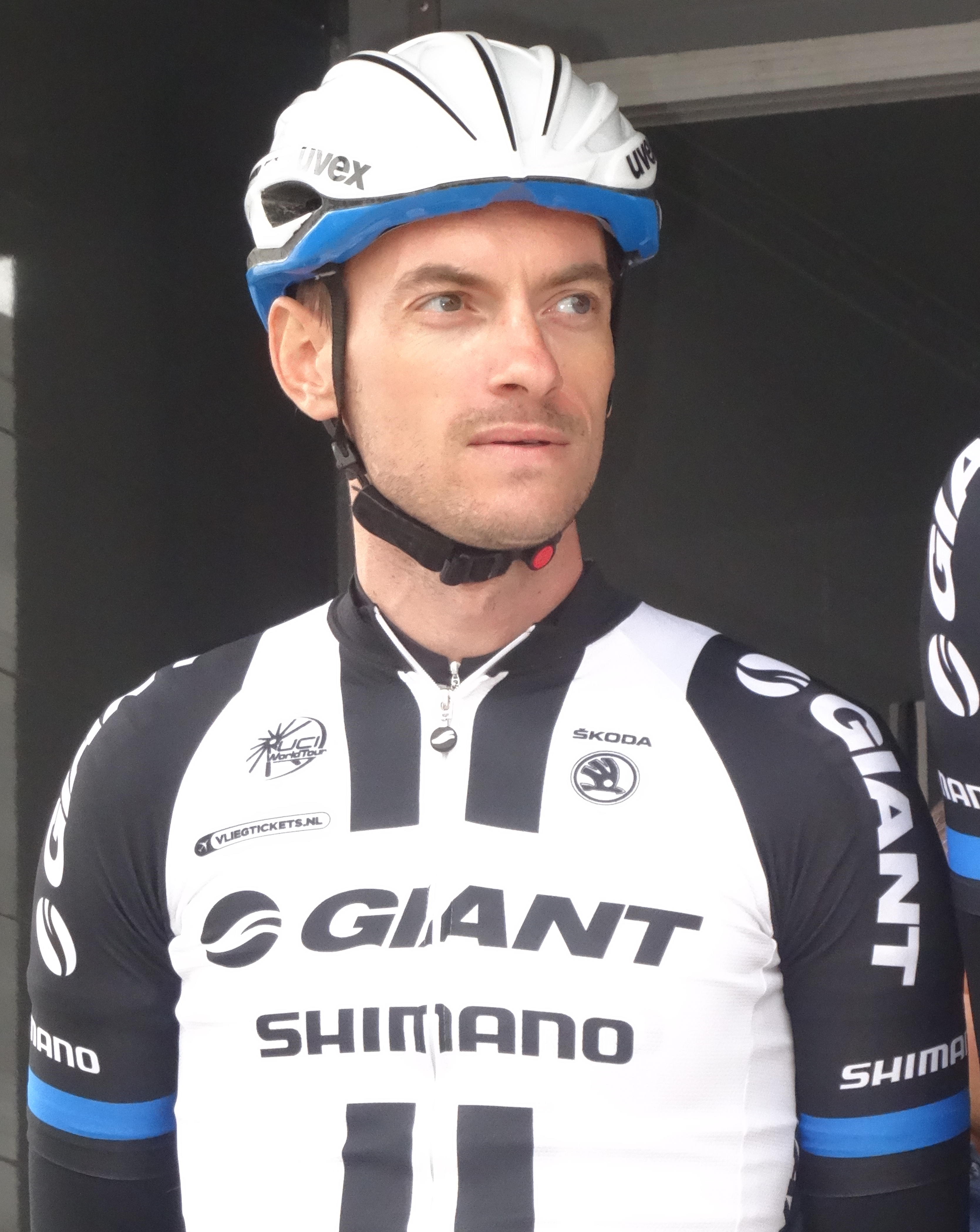 Reportage photographique réalisé le mercredi 24 septembre à l'occasion du départ et du début de la course du Circuit du Houtland 2014 à Lichtervelde, Belgique.